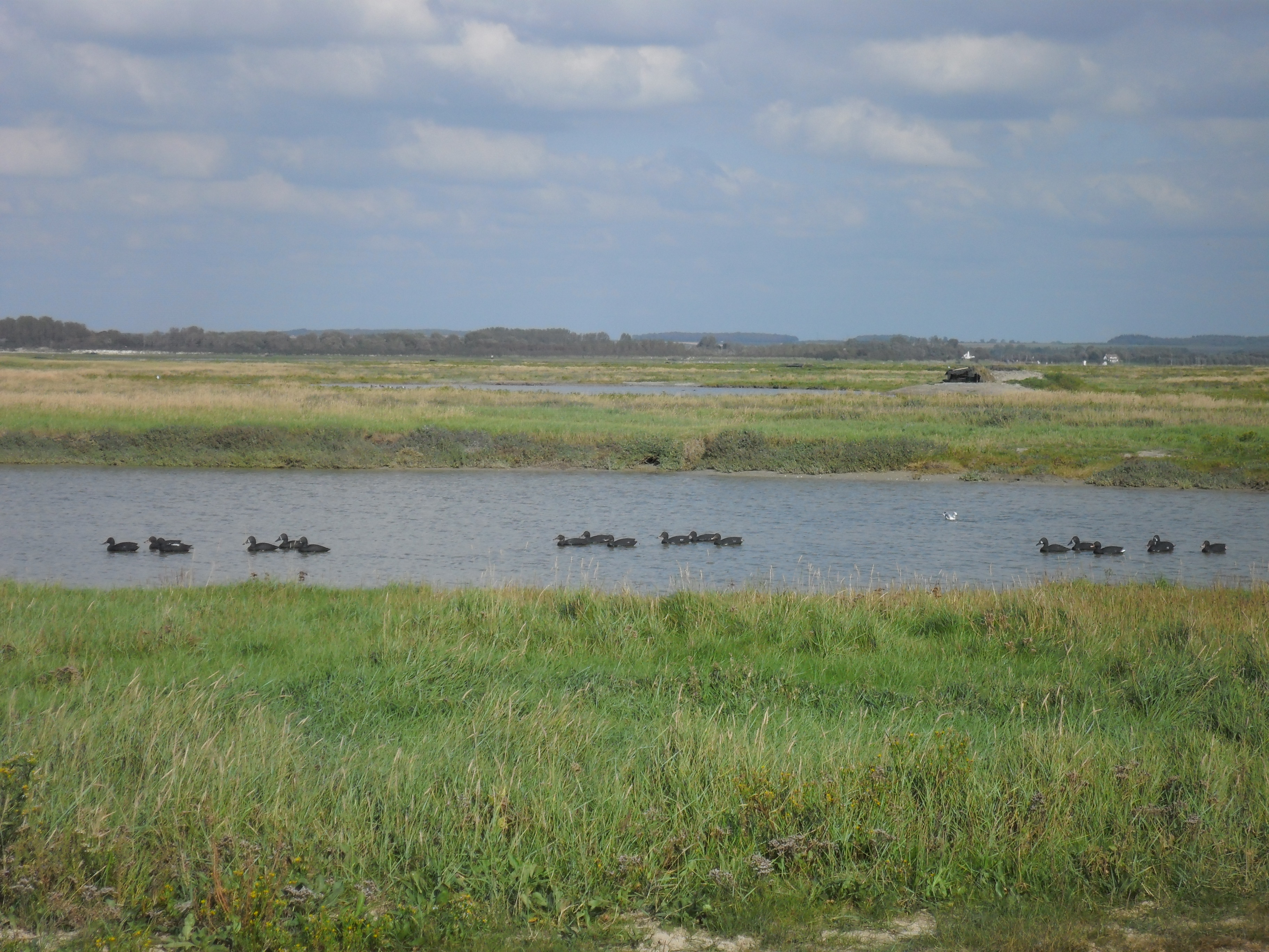 Mollières en Baie d'Authie. Cette baie est située entre les départements du Pas-de-Calais et de la Somme, en France.